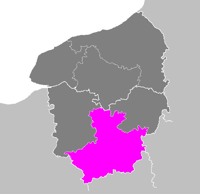 Maps of arrondissements and cantons of France: Arrondissement d Évreux.PNG